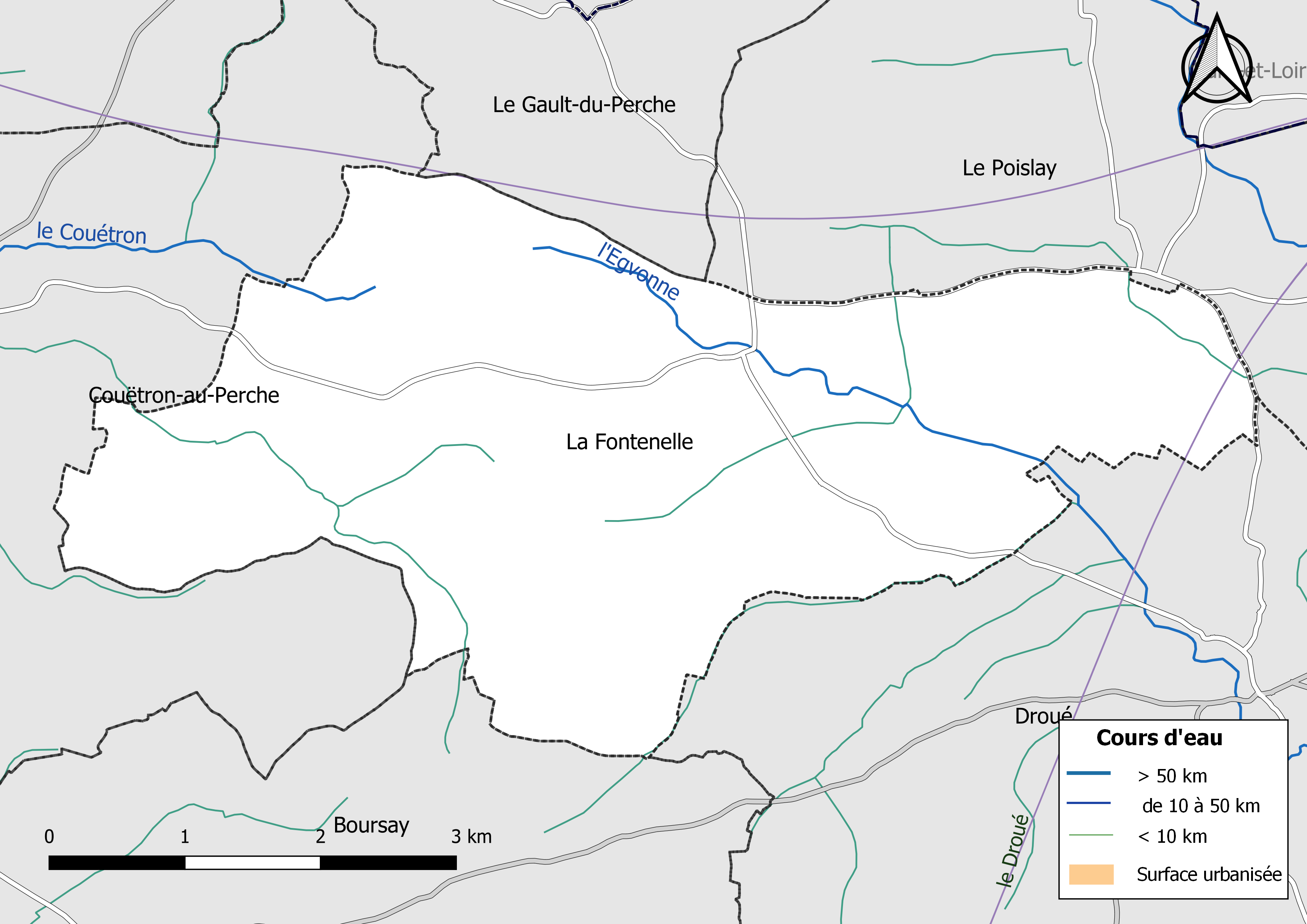 Carte du réseau hydrographique de la commune de La Fontenelle (Loir-et-Cher) (France).